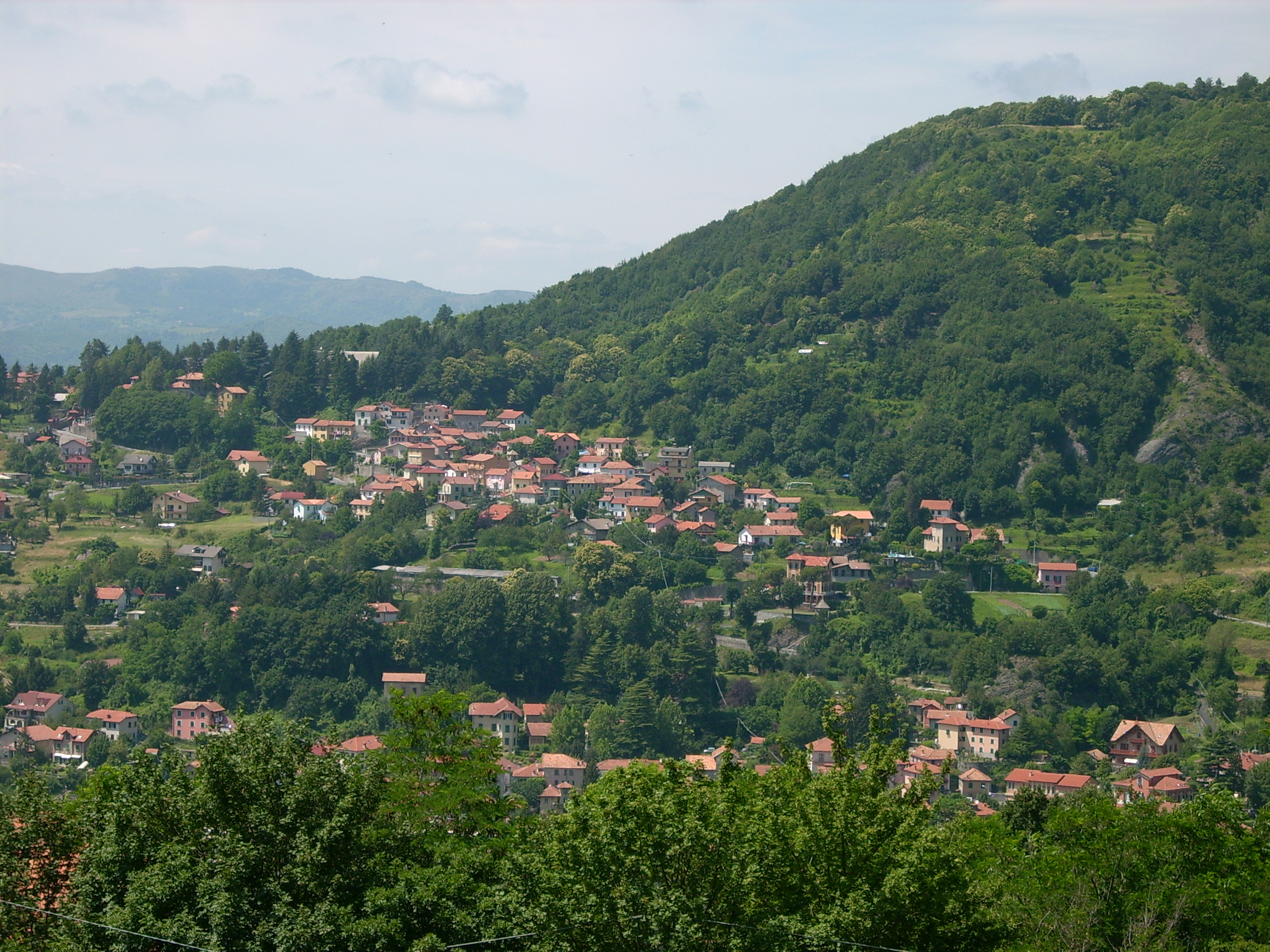 Savignone, Liguria, Italia